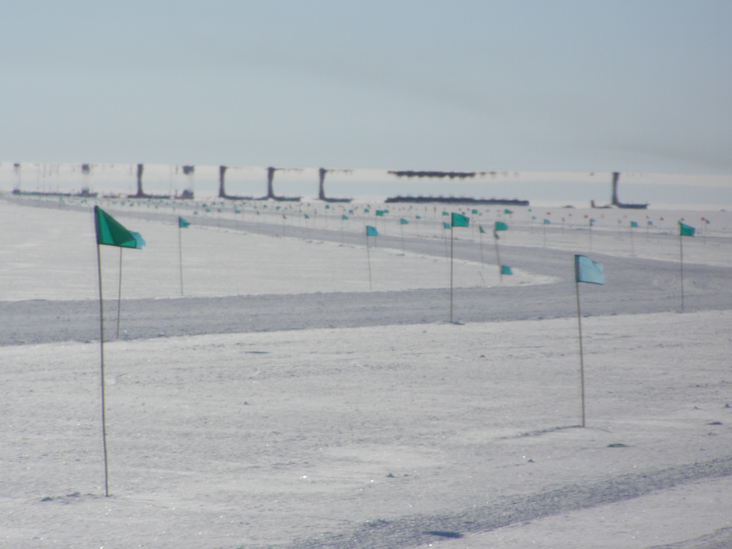 Mirage froid vu en Antarctique près de la base de Mc Murdo